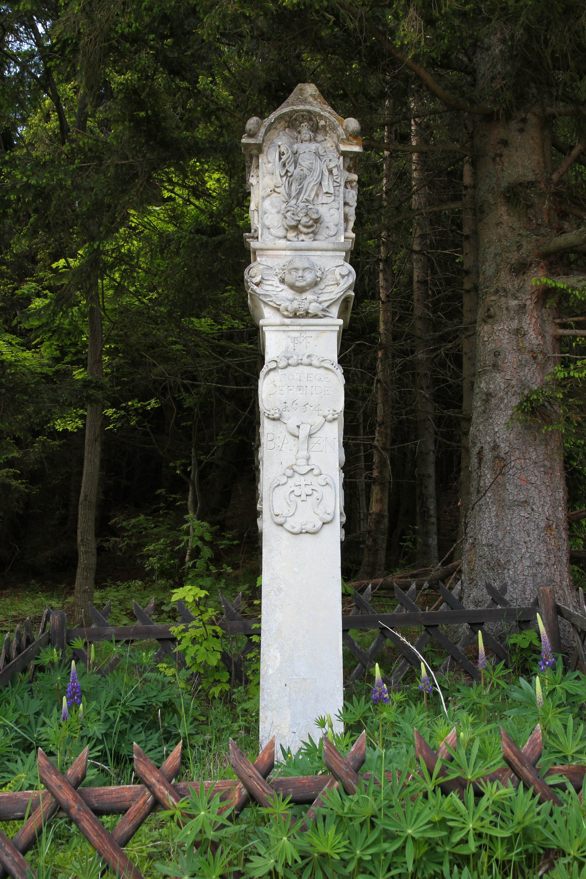 Die denkmalgeschützte Mariensäule auf der Passhöhe des Preiner Gescheid in der Ortschaft Prein an der Rax, ein Ortsteil der niederösterreichischen Marktgemeinde Reichenau an der Rax. Ein Tabernakelpfeiler aus Aflenzer Sandstein, den Abt Balthasar II. an höchster Stelle des Weges vom Stift Neuberg nach Reichenau im Jahr 1654 errichten ließ. Im Tabernakelaufbau finden sich die Reliefdastellungen der Mutter Gottes, links davon die hl. Barbara und rechts die hl. Elisabeth.